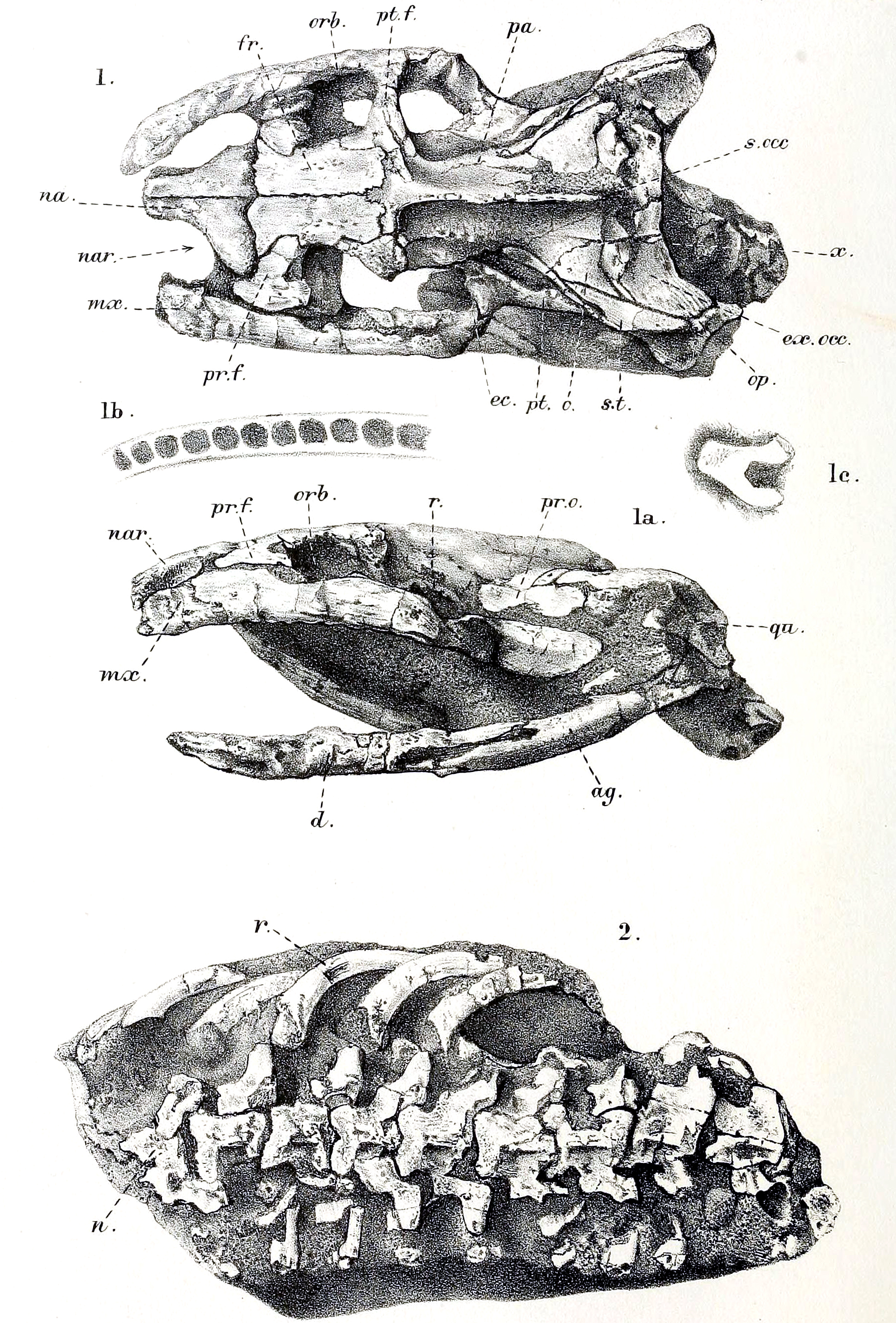 Dinilysia patagonica skull and vertebrate column